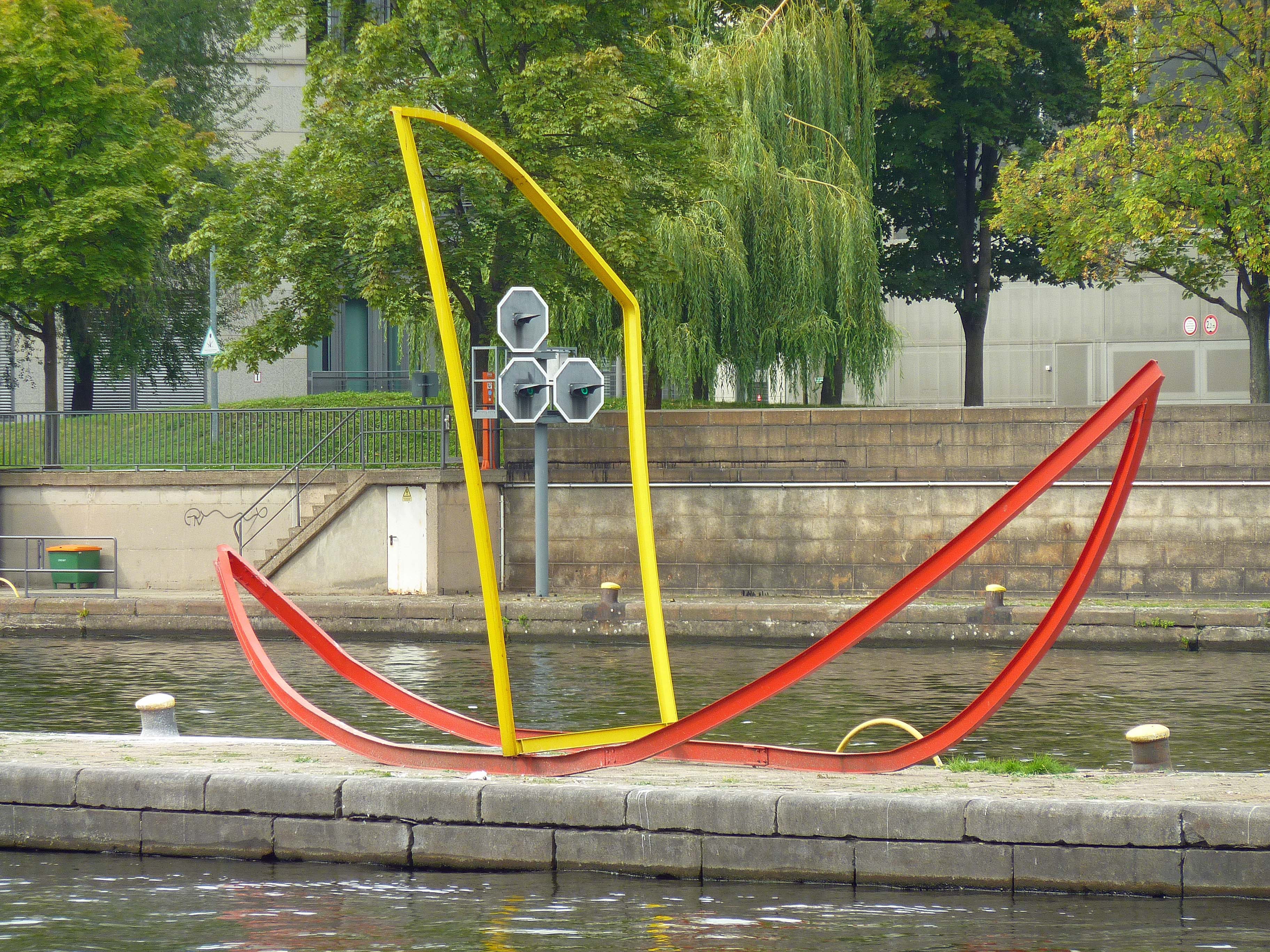 'Gegen die Strömung', Installation aus Baustahlträgern von Eduard Habicher aus dem Jahr 2010 an der Spree und der Mühlendammschleuse in Berlin-Mitte. Teil Habichers Wassergalerie 'Der Rote Faden am Hafen' entlang des Spreekanals.